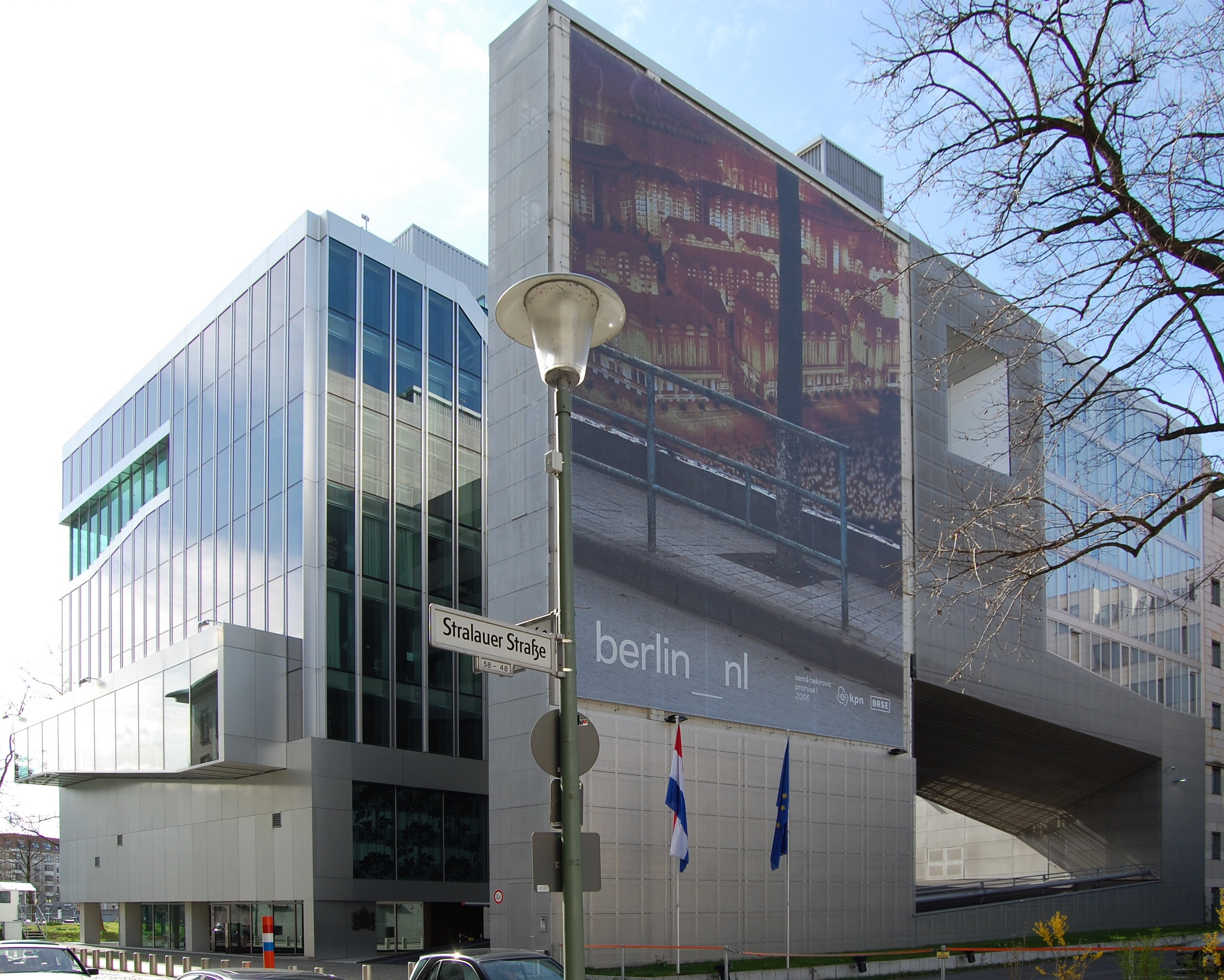 Dutch Embassy in Berlin